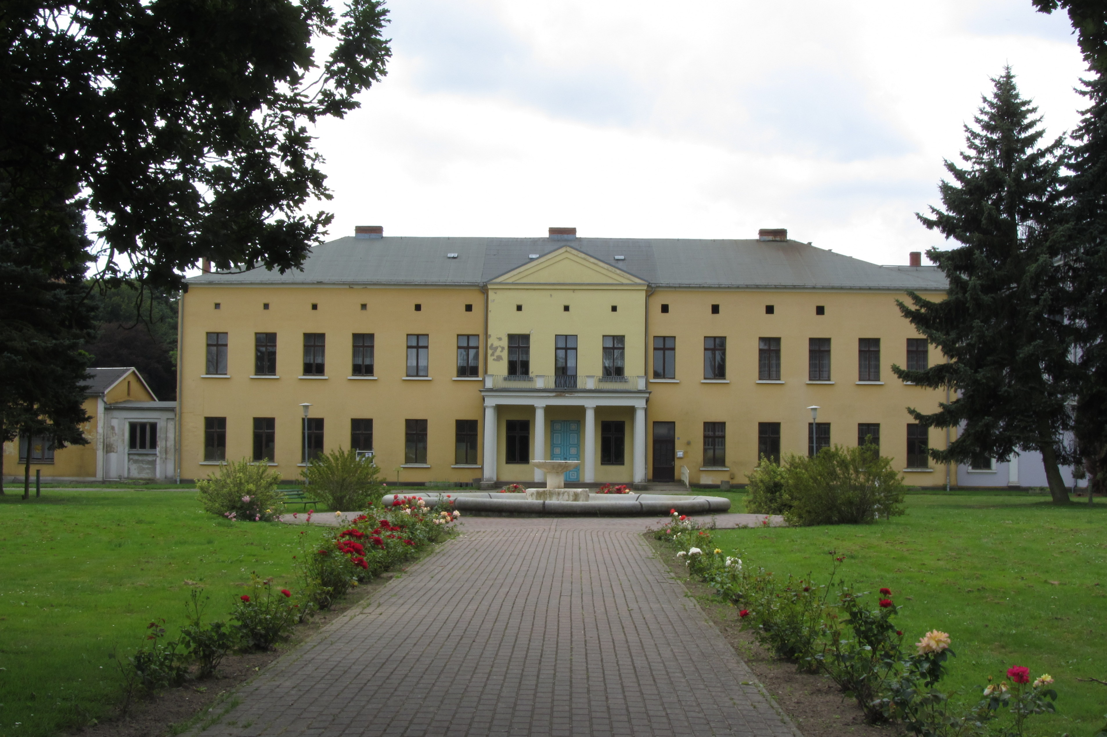 Semlower Schloss von vorn